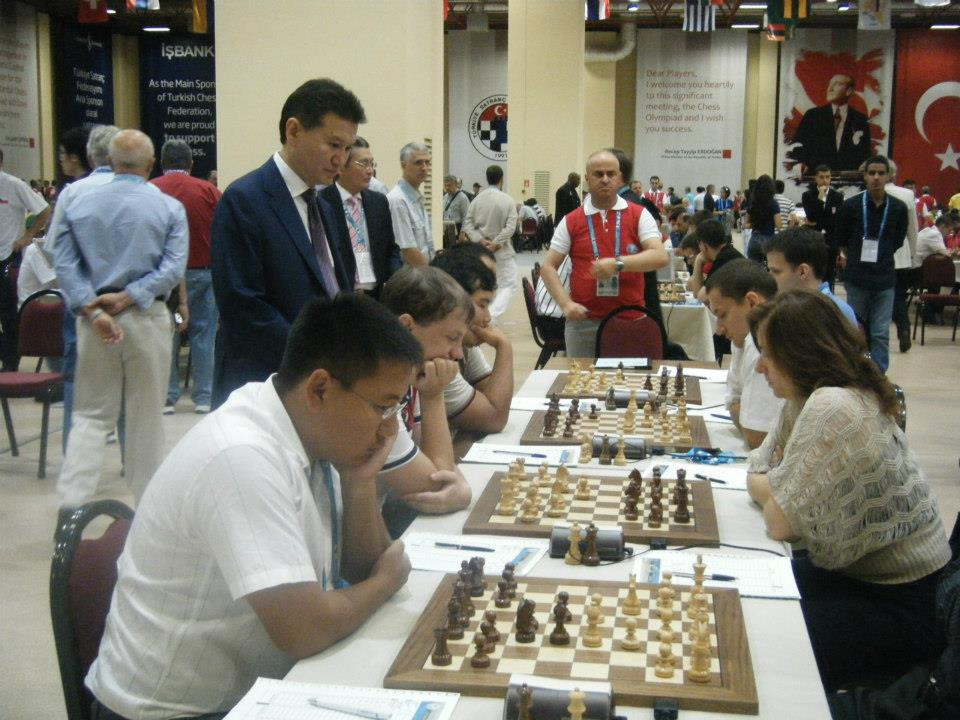 40e Olympiade d'échecs organisée à Istambul. L'ex président de la République de Kalmoukie et président de la fédération internationale d'échecs, Kirsan Ilyumzhinov, debout à gauche, visite les joueurs. En face du président, on voit la Hongroise, grand maître international, Judit Polgár.